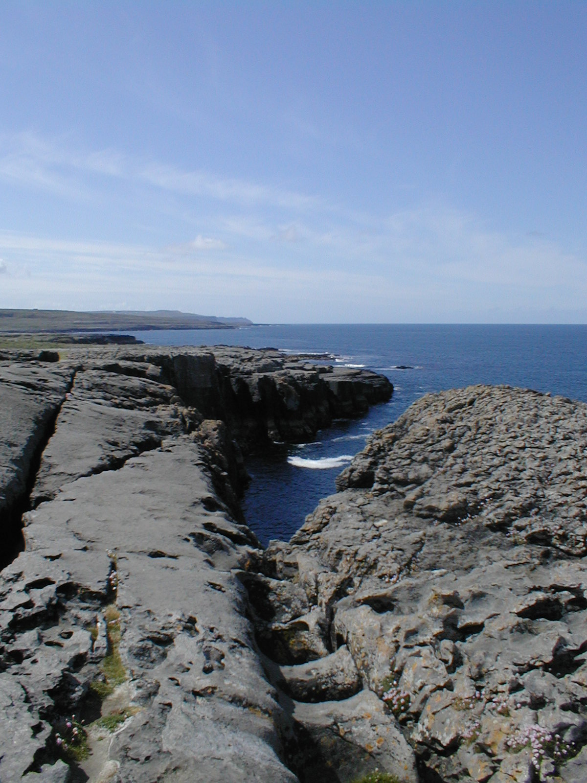 Küste des Burren, co. Clare, Ireland